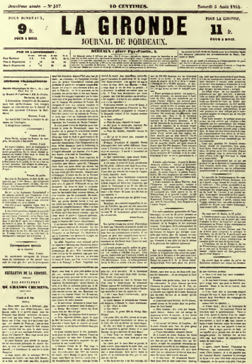 Journal La Gironde du 8 août 1854